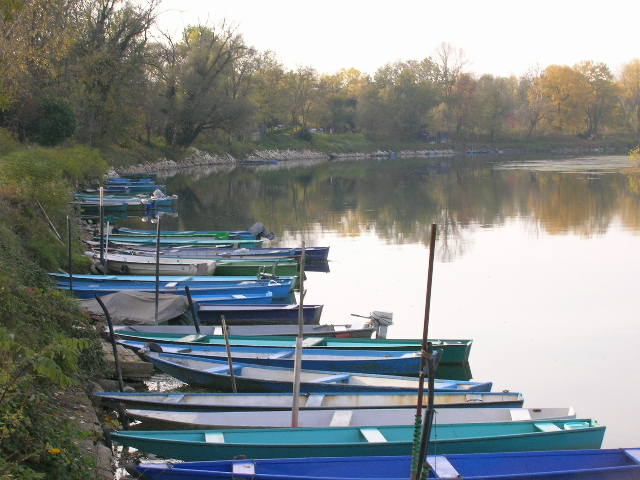 River Adda near Lodi